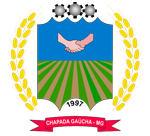 Brasão_Chapada_Gaúcha_MG.gif